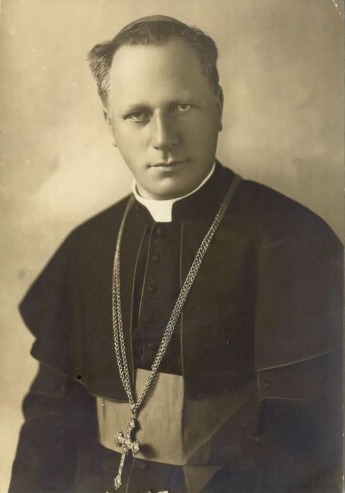 Gregorij Rožman (1883–1959), Slovene bishop.